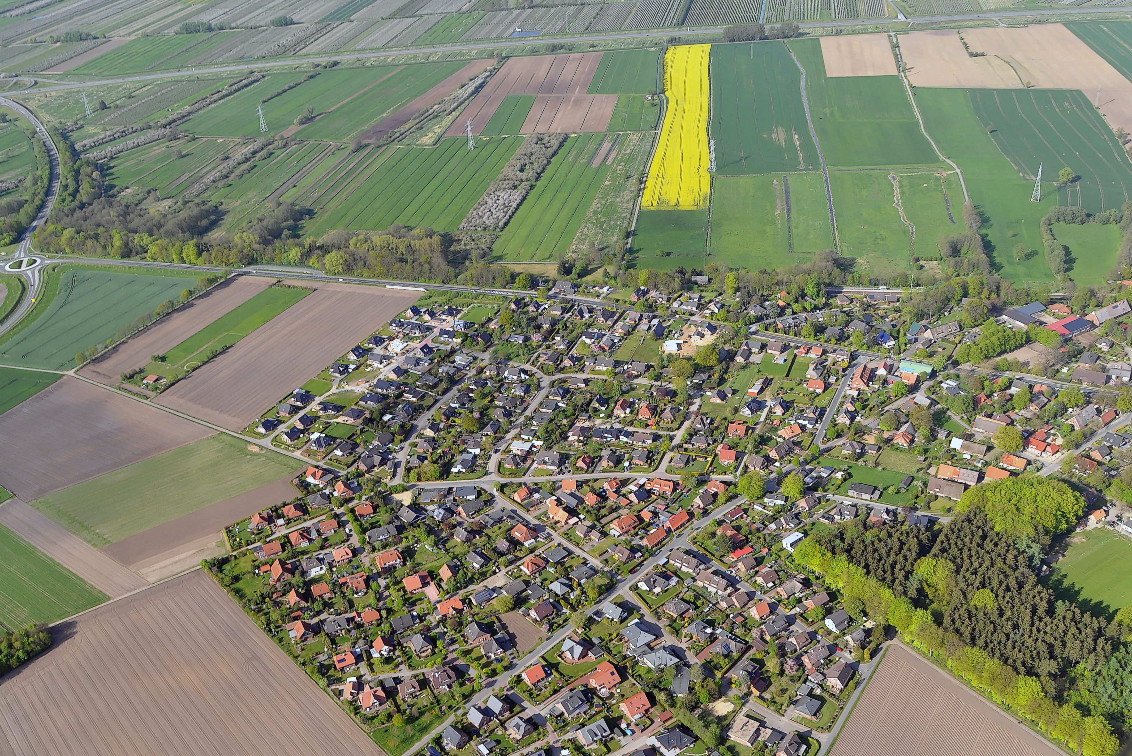 Luftbilder von der Nordseeküste 2012-05